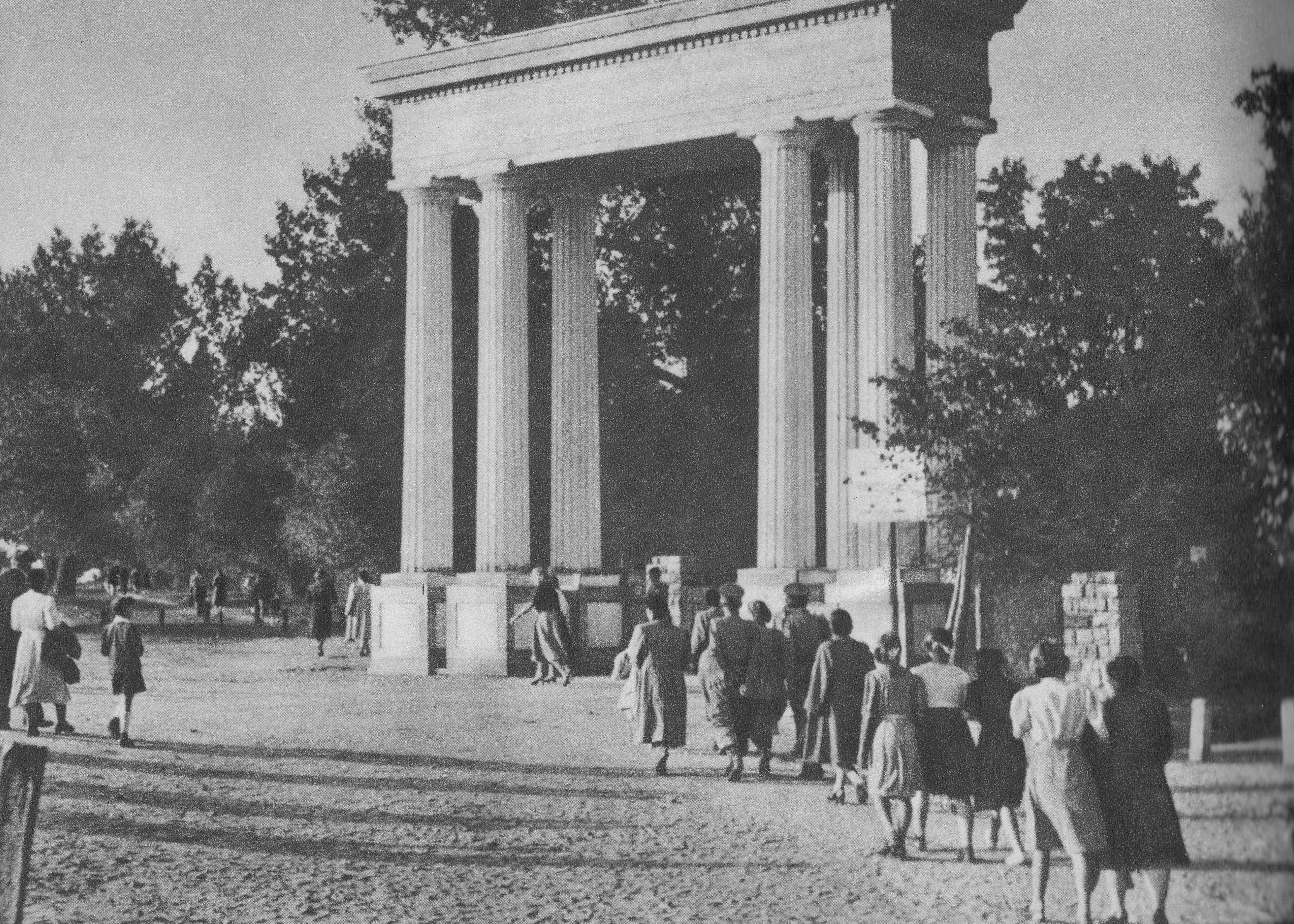 Brama wjazdowa do Parku Ludowego w Lasku Bielańskim na Bielanach